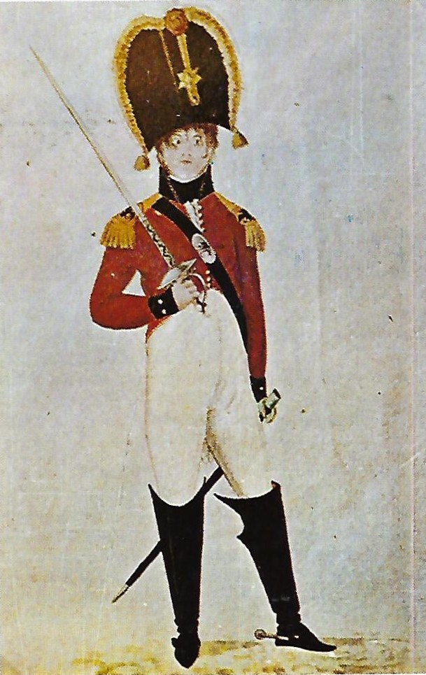 Aquarell eines Frankfurter Märkers („Generalanführer“) mit gezücktem Schläger, Stürmer, Kokarde in Orange, rotem Collet (Kragen und Aufschläge schwarz, goldene Epauletten), weißen Beinkleidern, Sporenstiefeln.